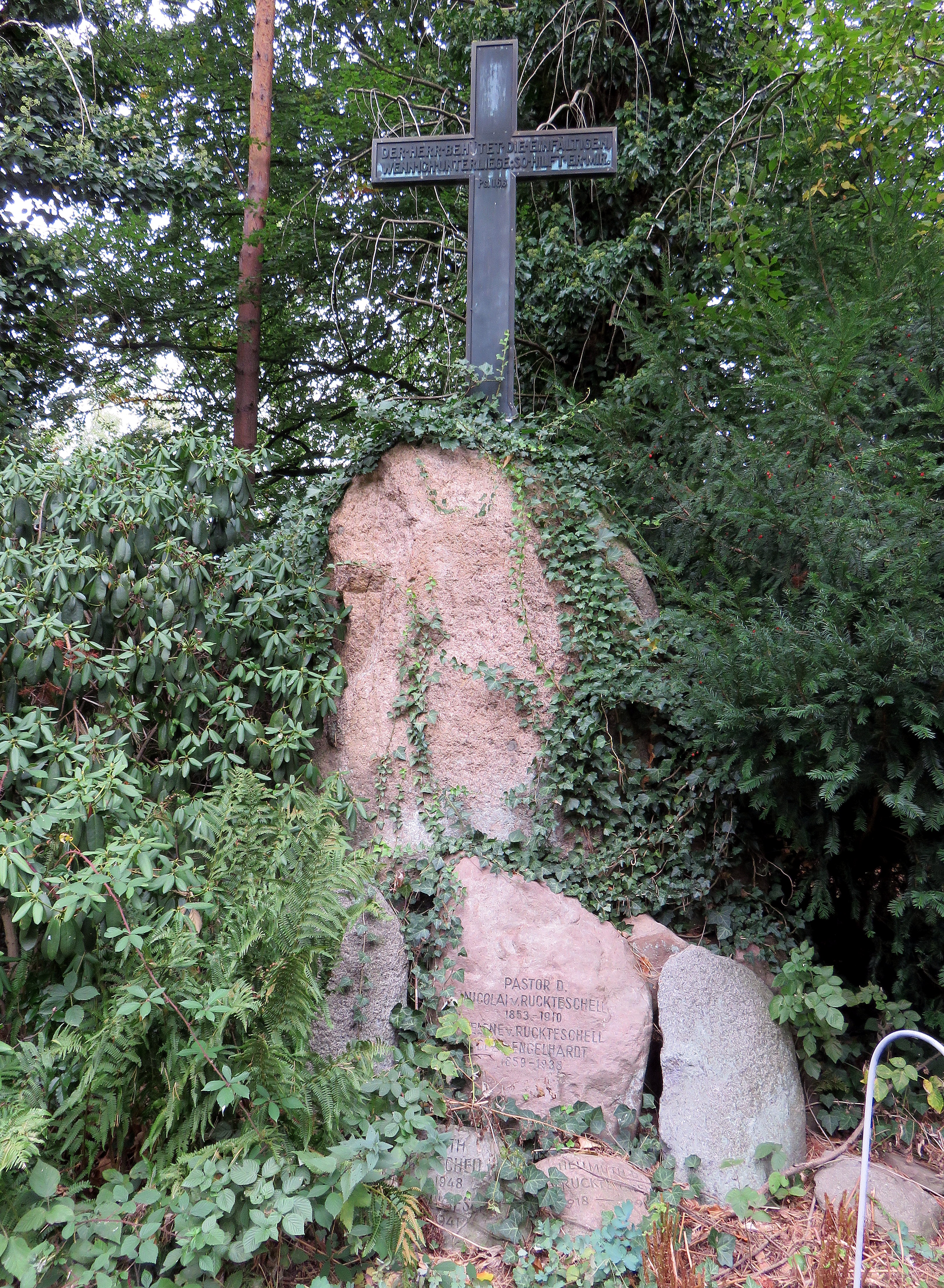 Ruhestätte des russisch-deutschen lutherischen Pastors Nicolai von Ruckteschell, Ohlsdorfer Friedhof, Planquadrat AD 19 (südwestlich Kapelle 7).